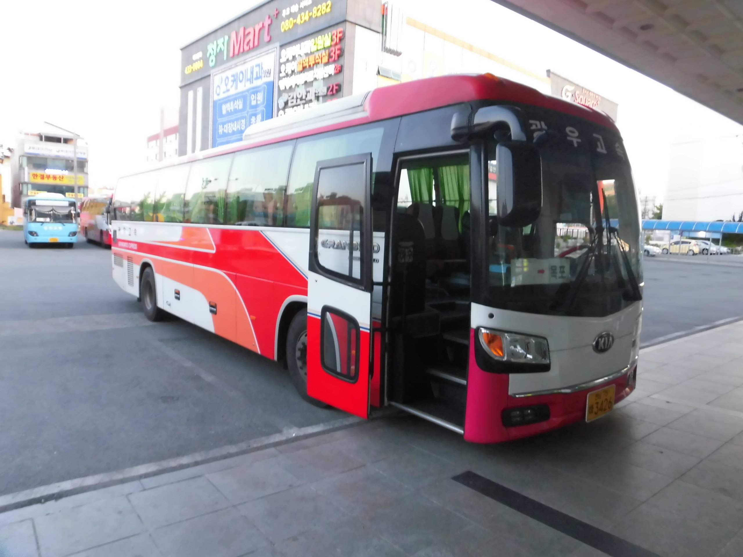 광우고속